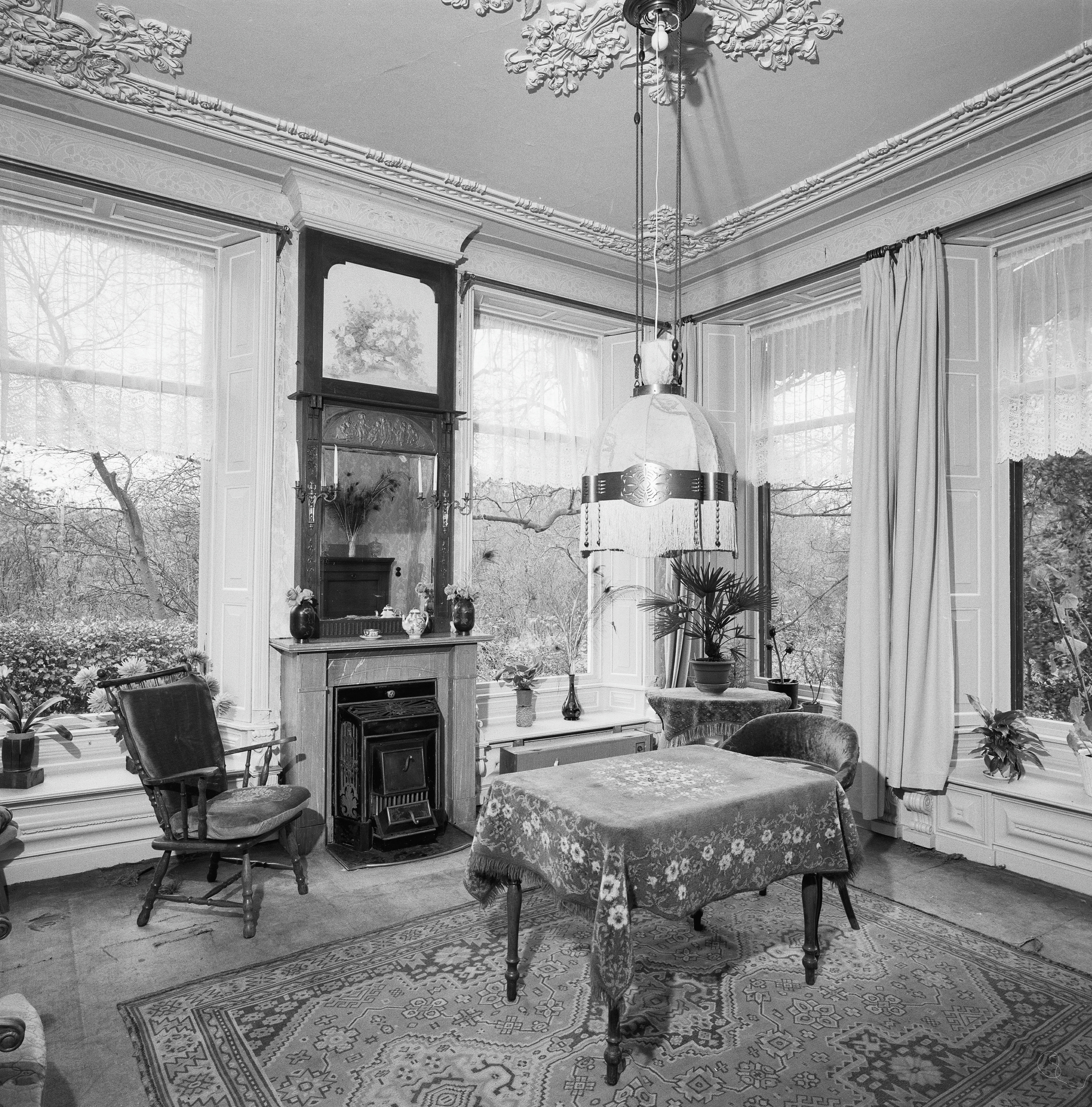 Boerderij: INTERIEUR, OVERZICHT PRONKKAMER